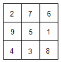 Magisk kvadrat af orden 3.